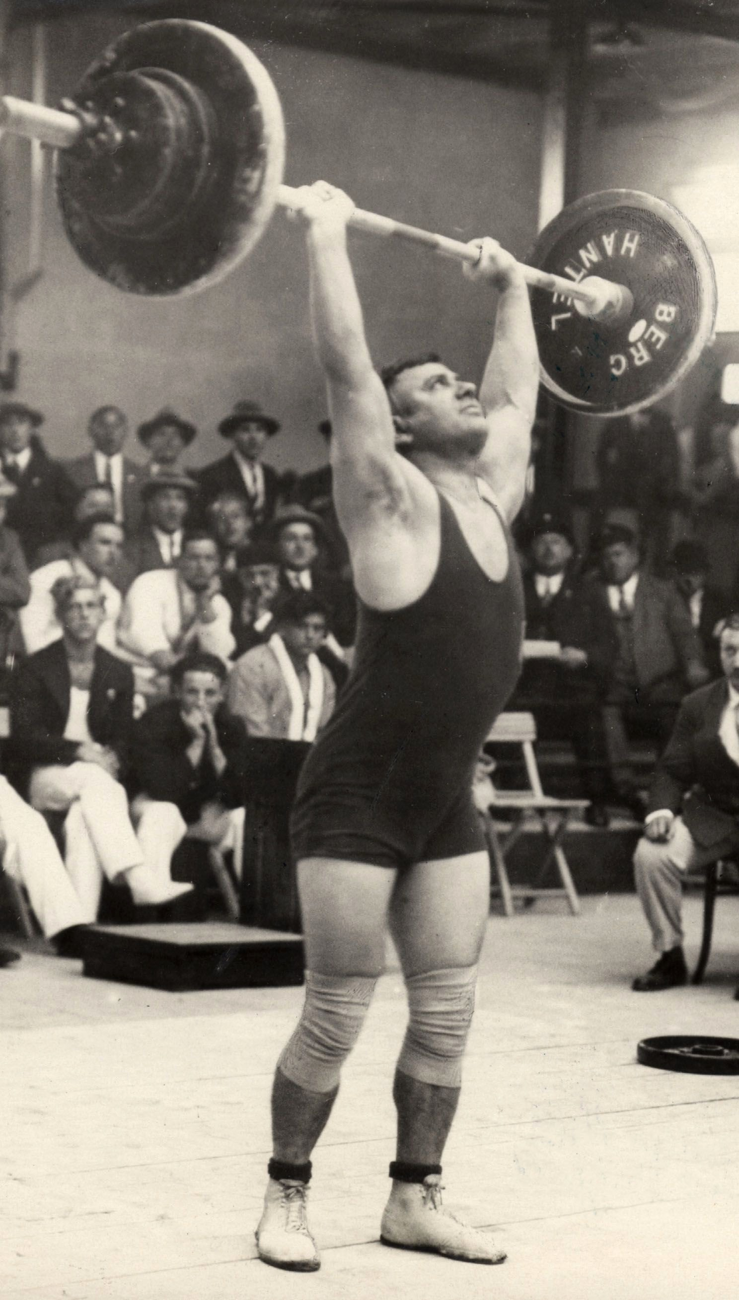 Sport. August G. Scheffer (uit Haarlem) 3e prijs gewichtheffen (midden A-gewicht), tijdens de Olympische Spelen in Amsterdam, Nederland 1928.